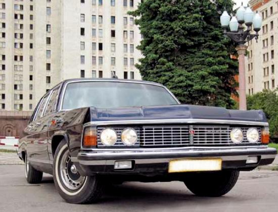 GAZ-15 Chaika